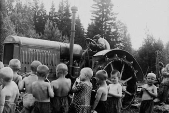 внедрение сельхозтехники в России